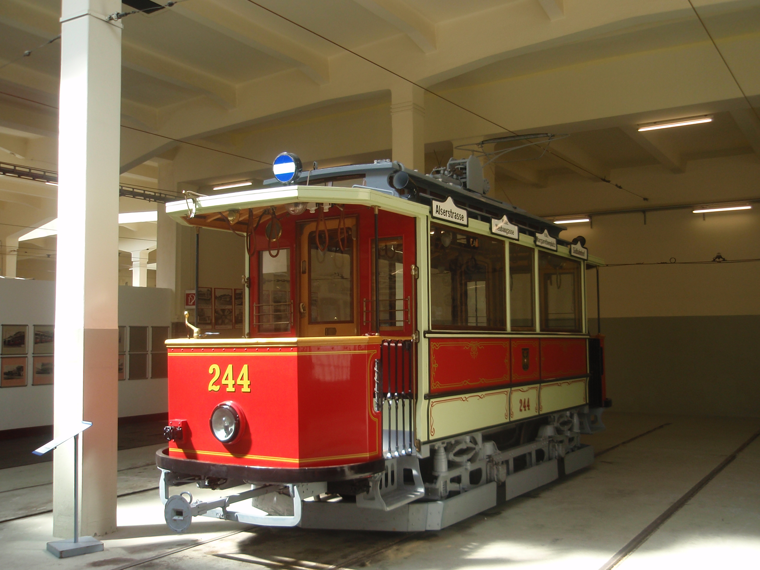 Wiener Straßenbahnmuseum Motorwagen Type D, Nr. 244, gebaut 1900 von der Grazer Waggonfabrik mit 18 Sitz- und 15 Stehplätzen. Bis zum Ersten Weltkrieg mussten die Fahrer meist ohne Windschutzscheiben auskommen. Der Wagen war zuletzt mit anderem Aussehen als Salzstreuwagen eingesetzt und wurde 1973 für das Museum angekauft